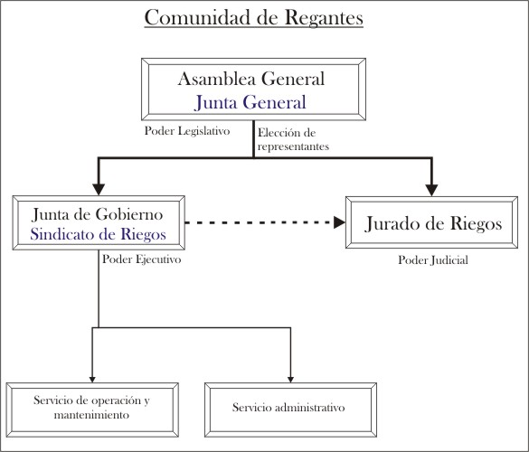 organización de una Comunidad de Regantes